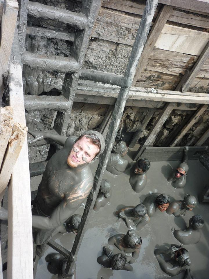 Český badatel v nitru sopky El Totumo